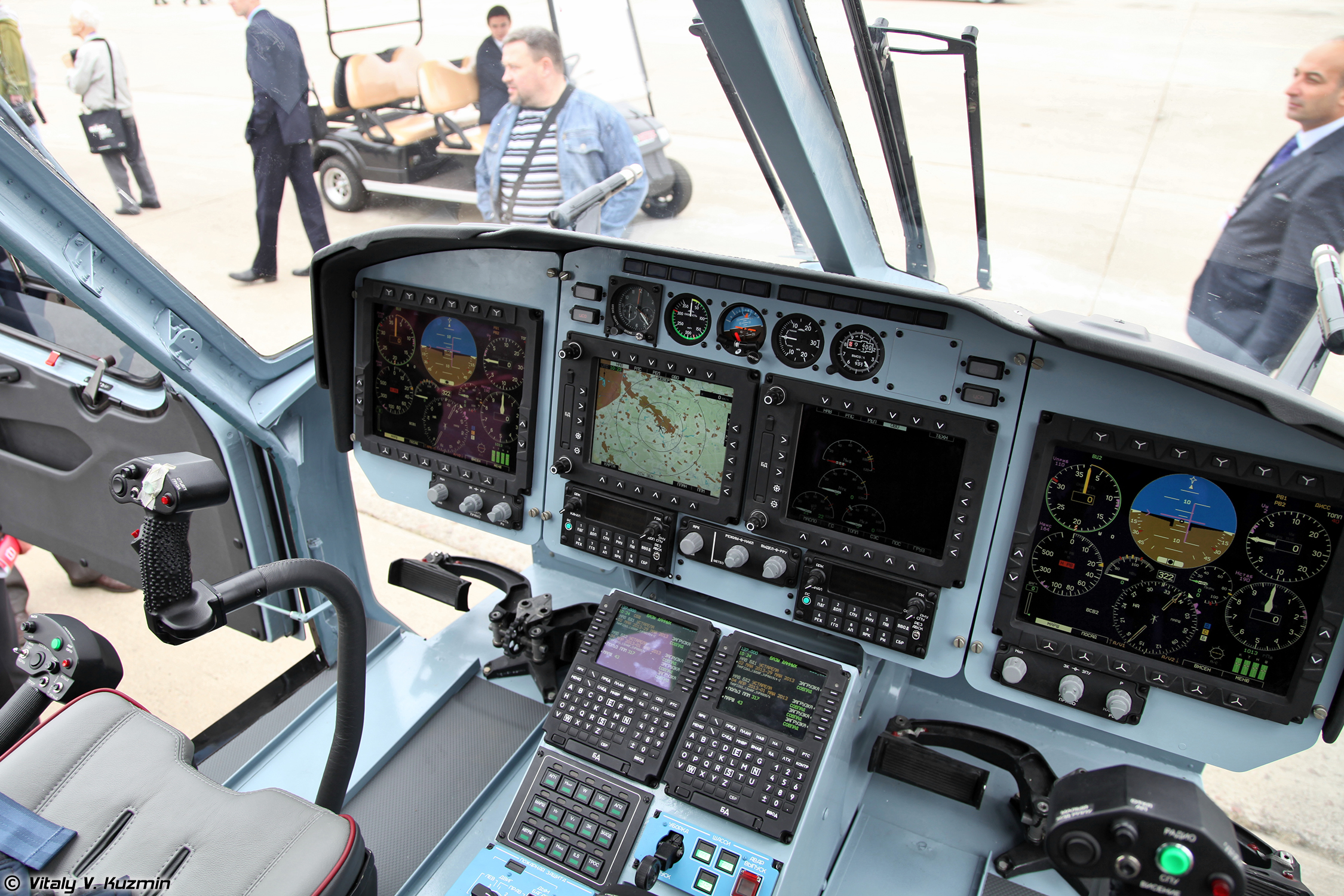 Кабина Ка-62 (Ka-62 cockpit)